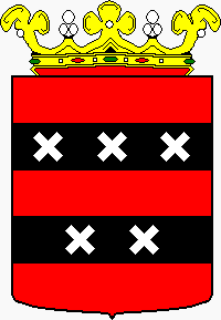 Gemeentewapen Ouder Amstel